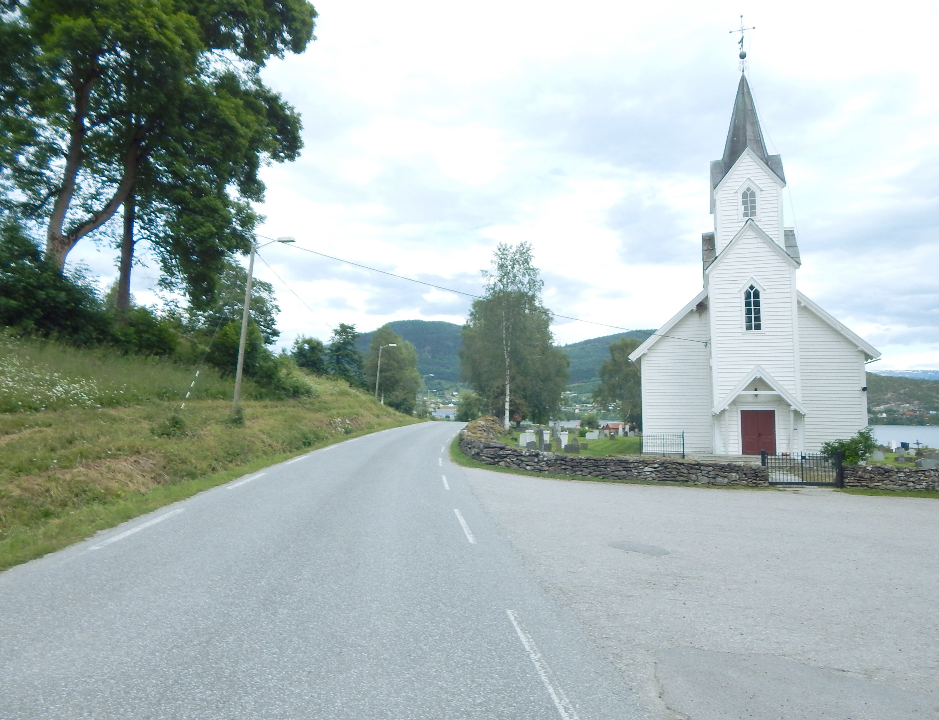 Fylkesvei 337 forbi Hafslo kirke